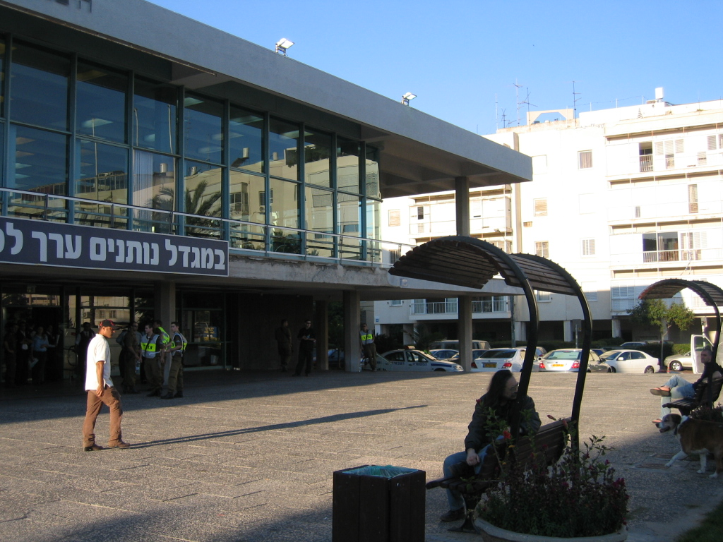 Fredric R. Mann Auditorum in Tel aviv היכל התרבות בתל אביב